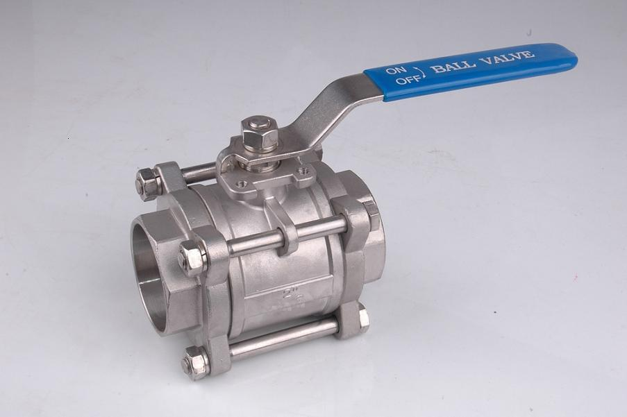 Alloy valve / ball valve.